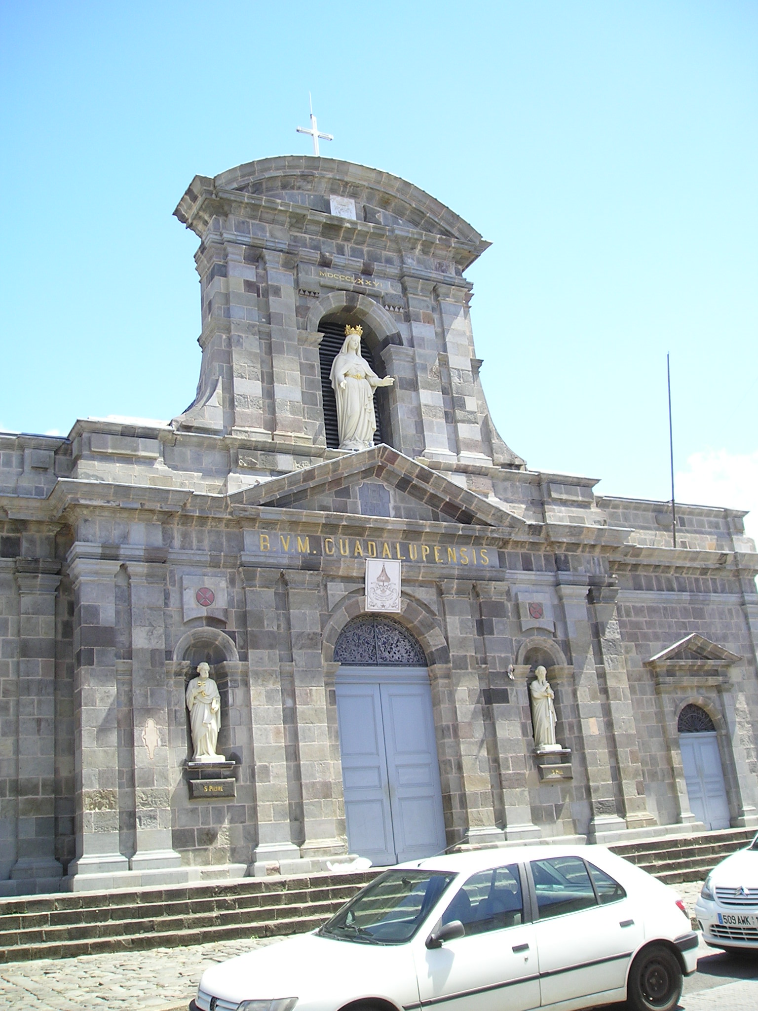 Cathédrale Notre-Dame de Guadaloupe (Basse Terre)